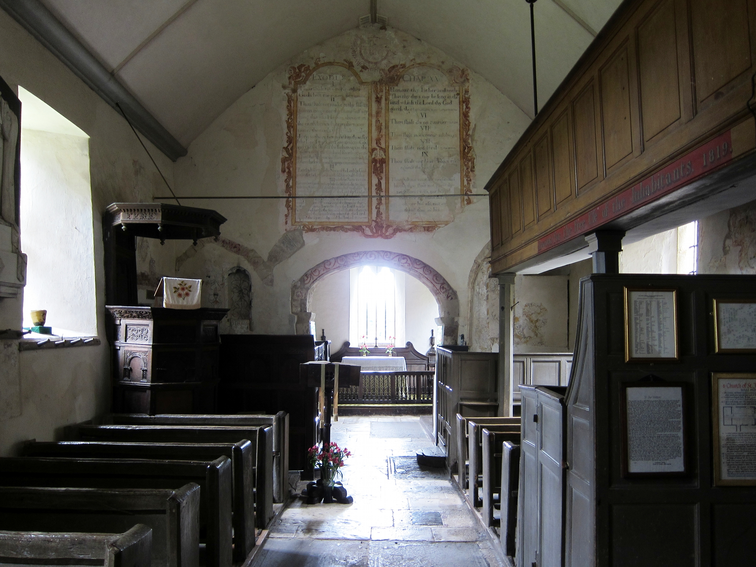 La nef de la St James church à Cameley (Somerset).